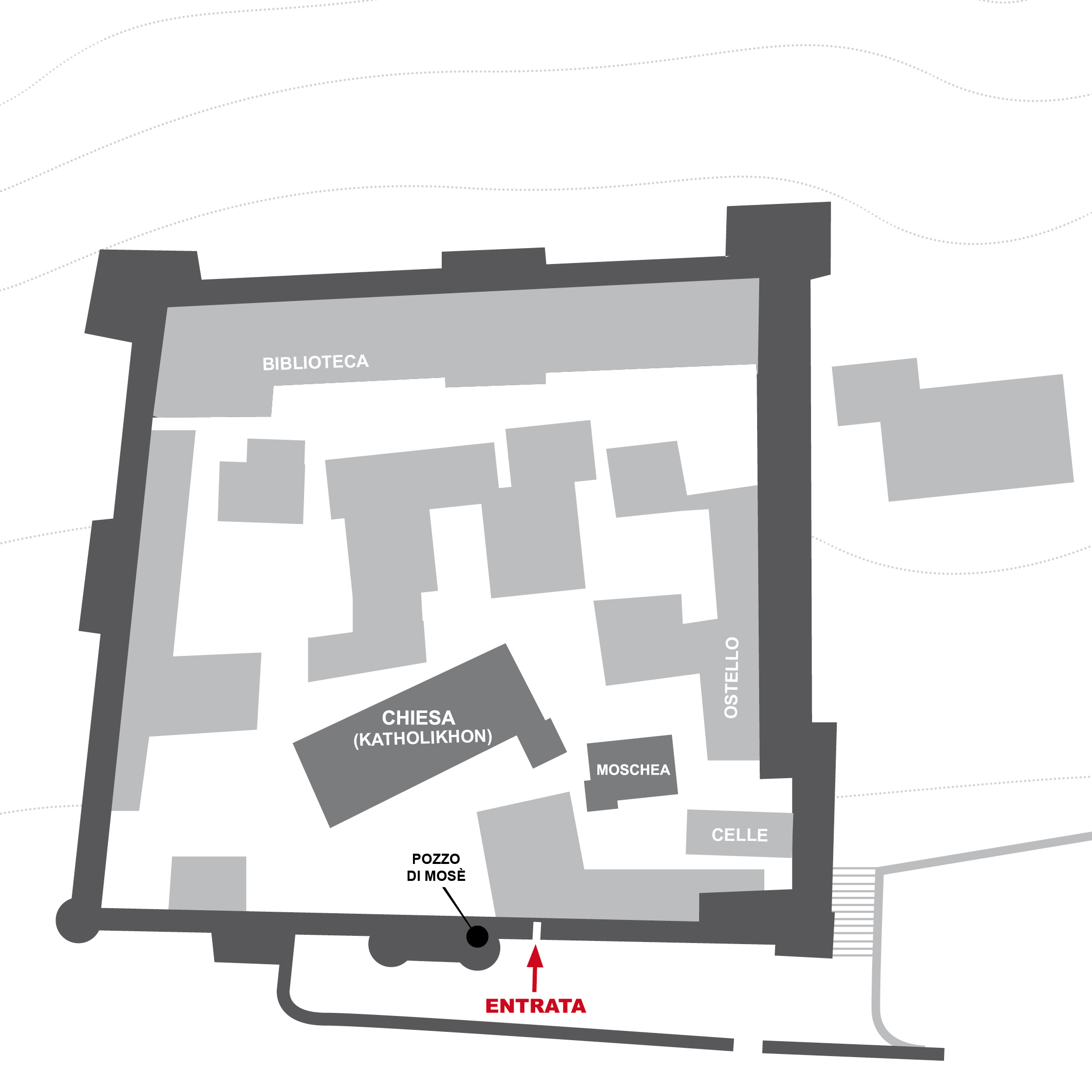 Planimetria del Monastero di Santa Caterina presso il Sinai (Egitto)